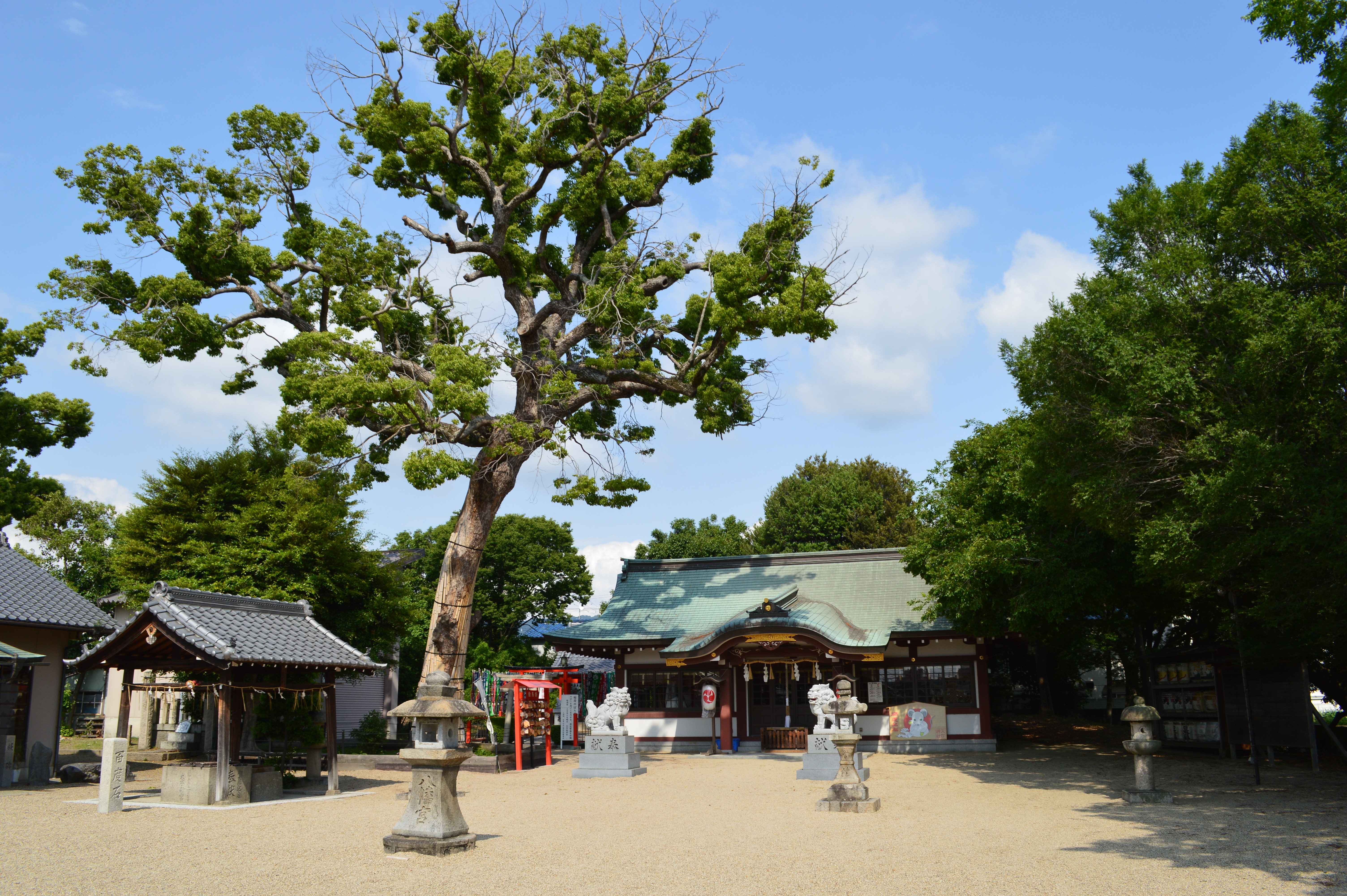 矢作神社 (八尾市) 境内